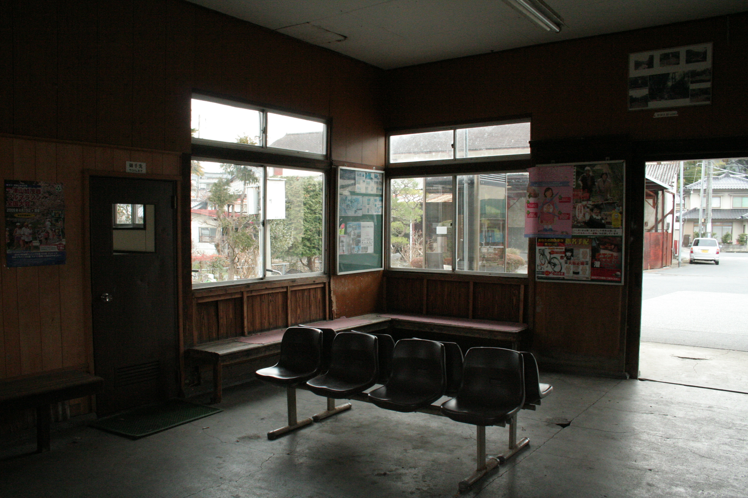 美作江見駅の改札口よりみた駅舎内待合室。左手のドアはトイレの入口。